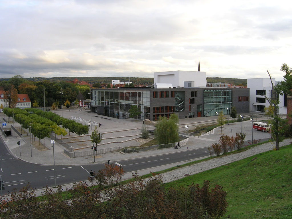 Theater Erfurt (errichtet zwischen 1999 und 2003), am Theaterplatz in Erfurt